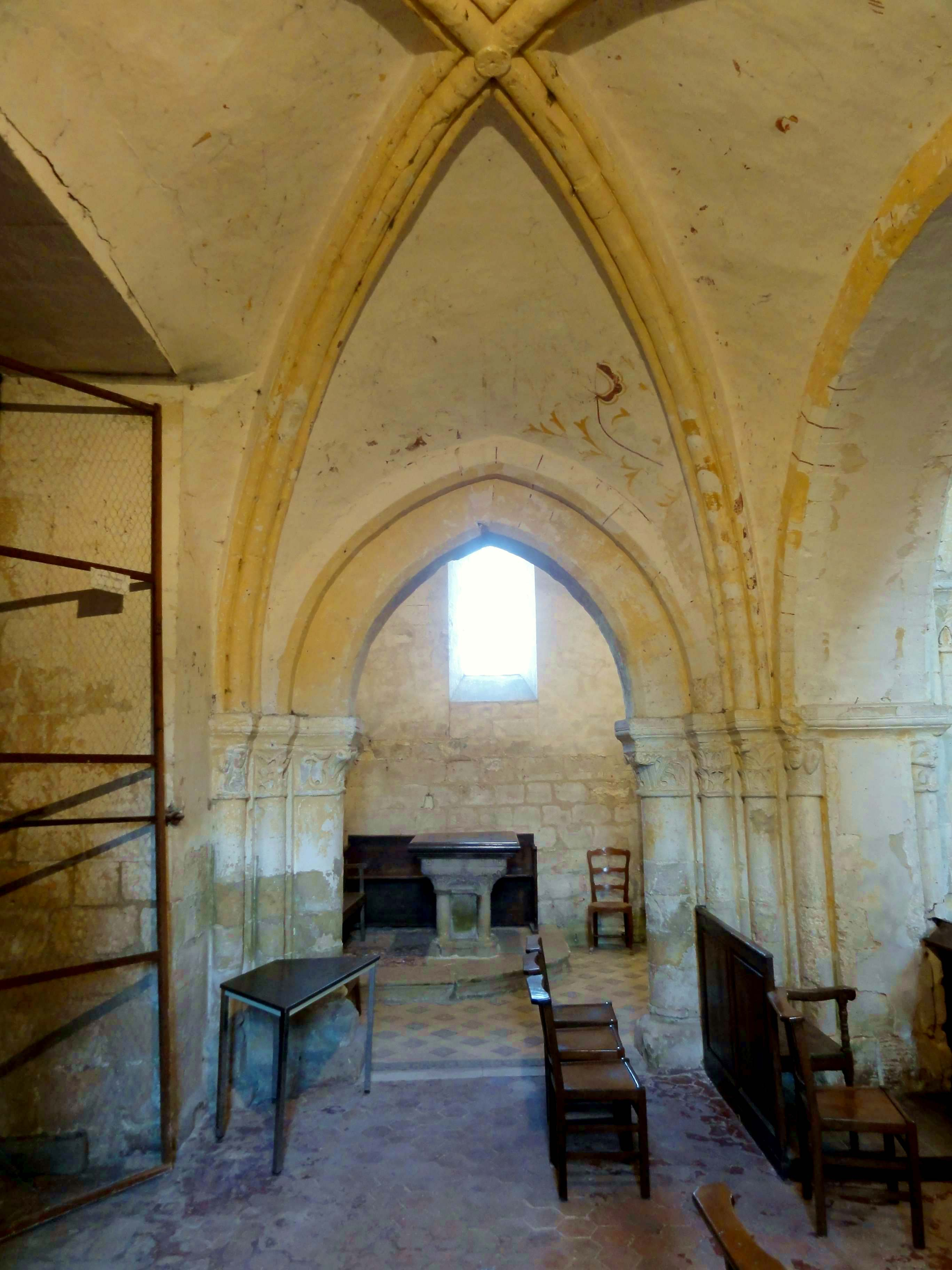 Intérieur de l'église - voir titre.